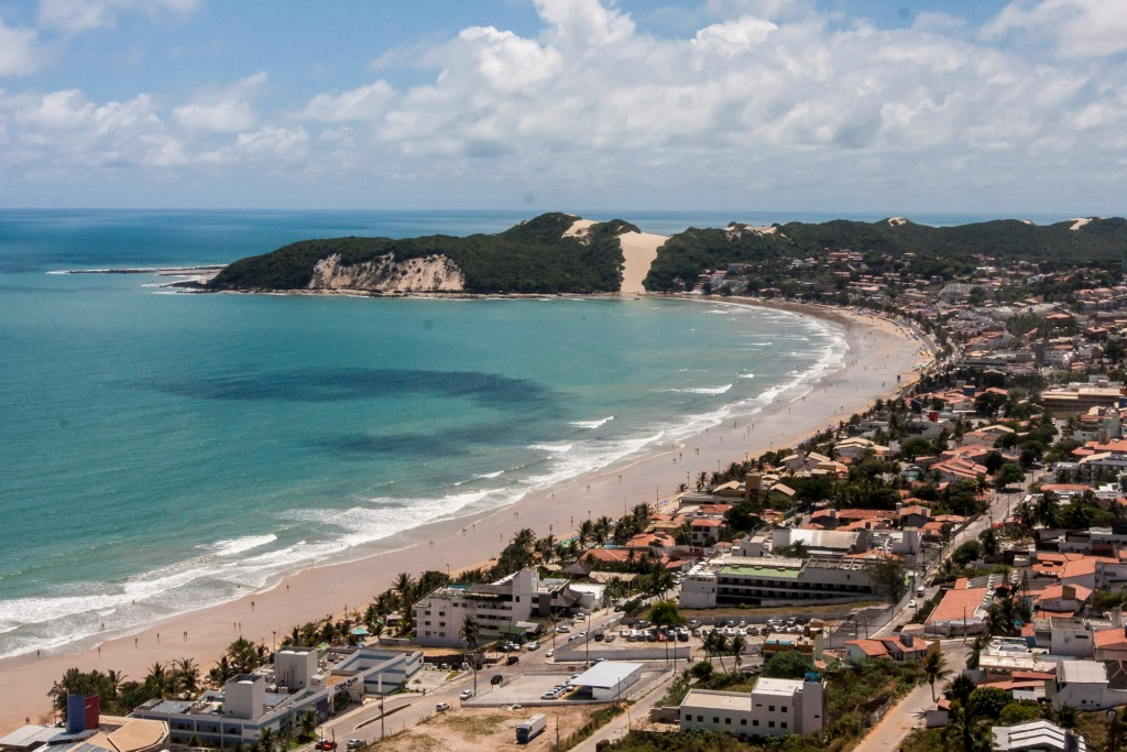 Vista da Praia de Ponta Negra, em Natal, Rio Grande do Norte, Brazil.